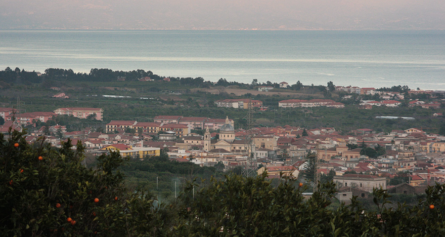 Panorama di Mascali